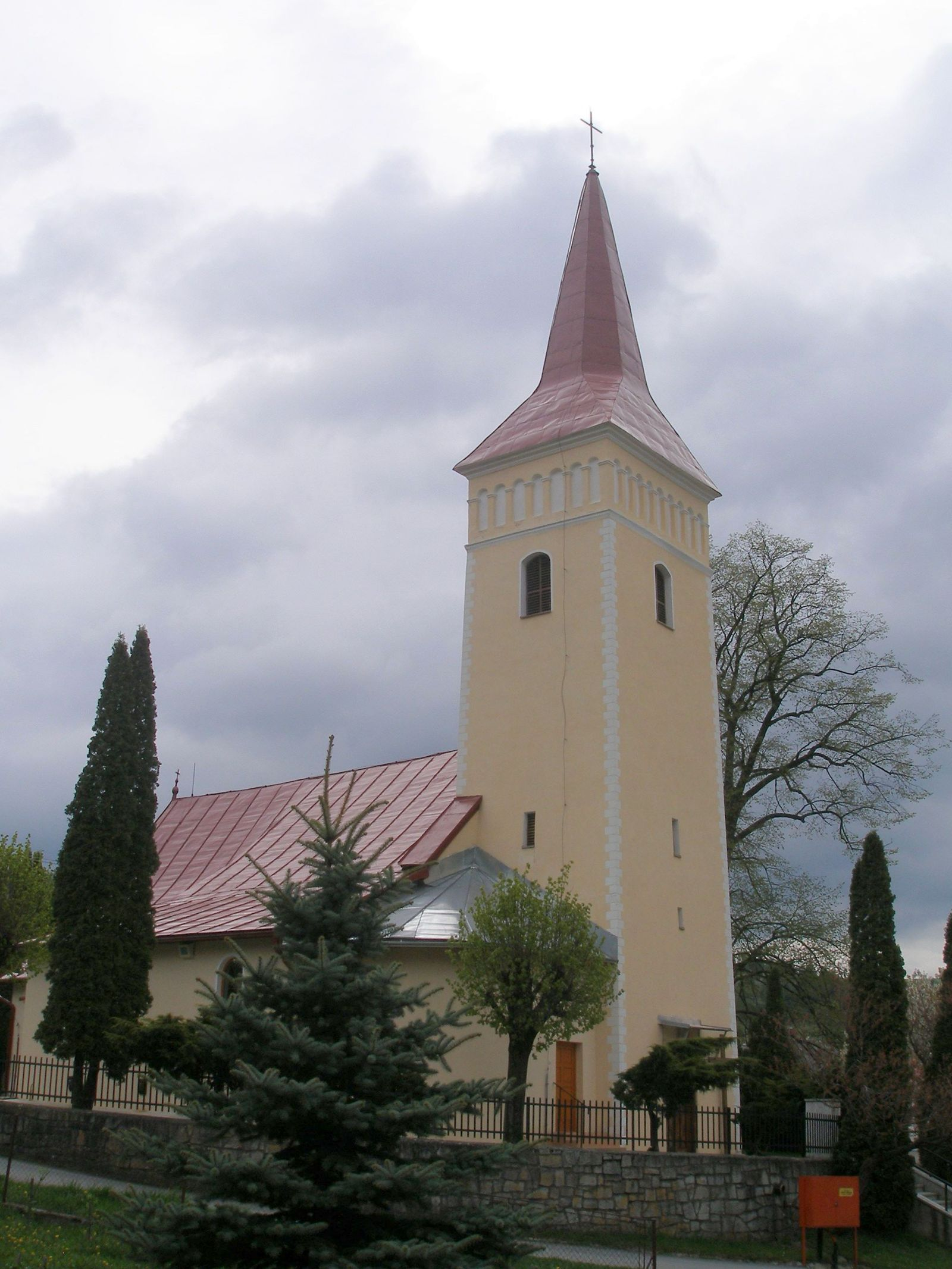 Obec Lipovce okres Prešov región Šariš